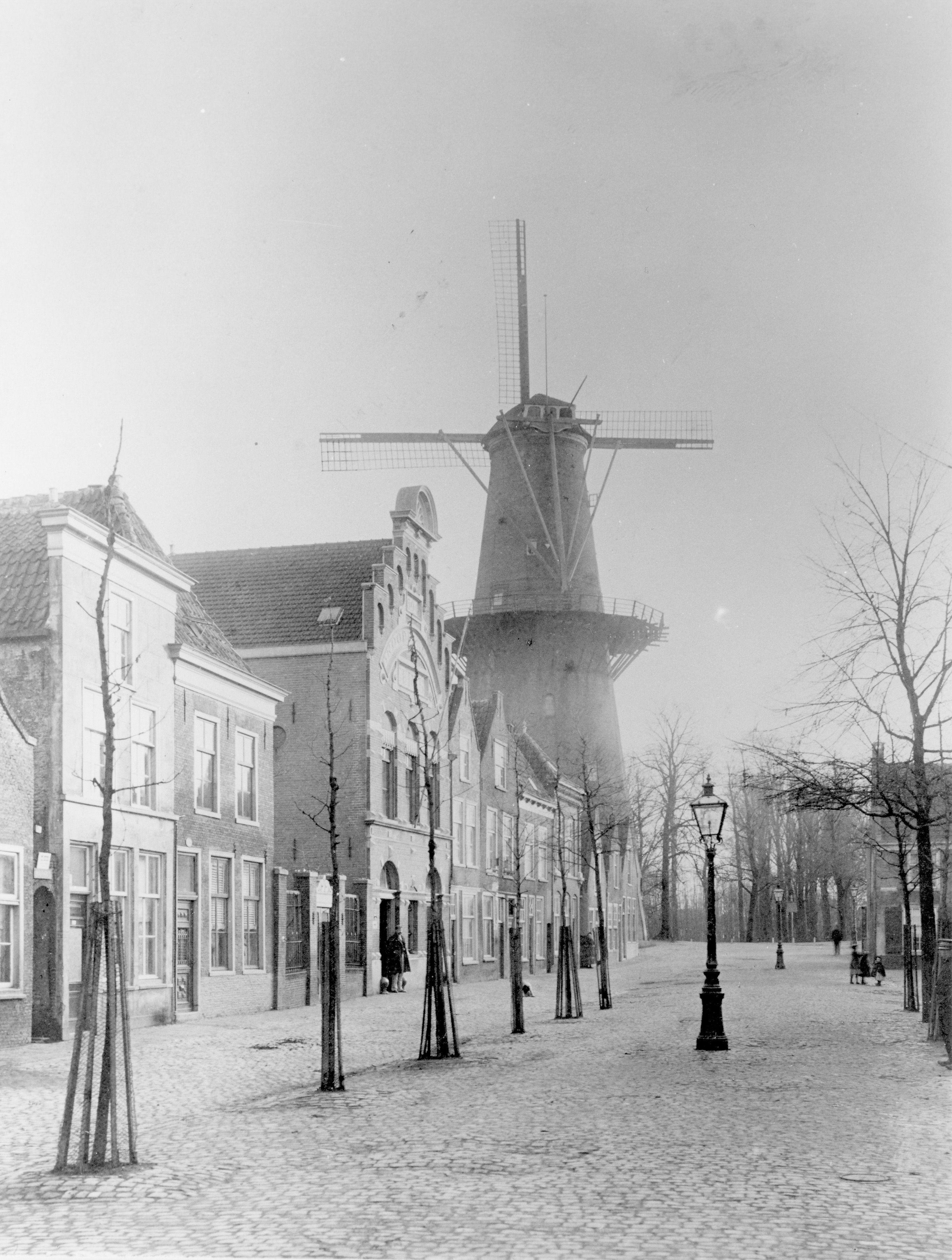 Molen De Oranjeboom vanaf Zijdgracht ( nu Korevaarstraat). Circa 1900